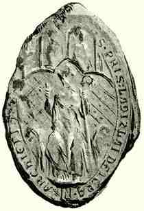 Jánki László kalocsai érsek pecsétje